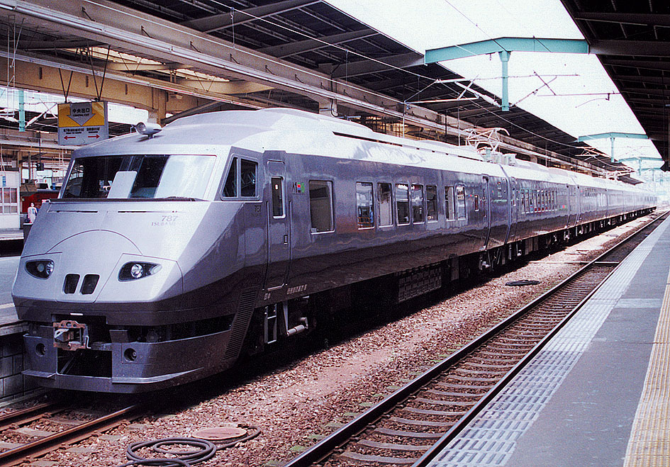 JR九州 787系特急形電車 特急「つばめ」